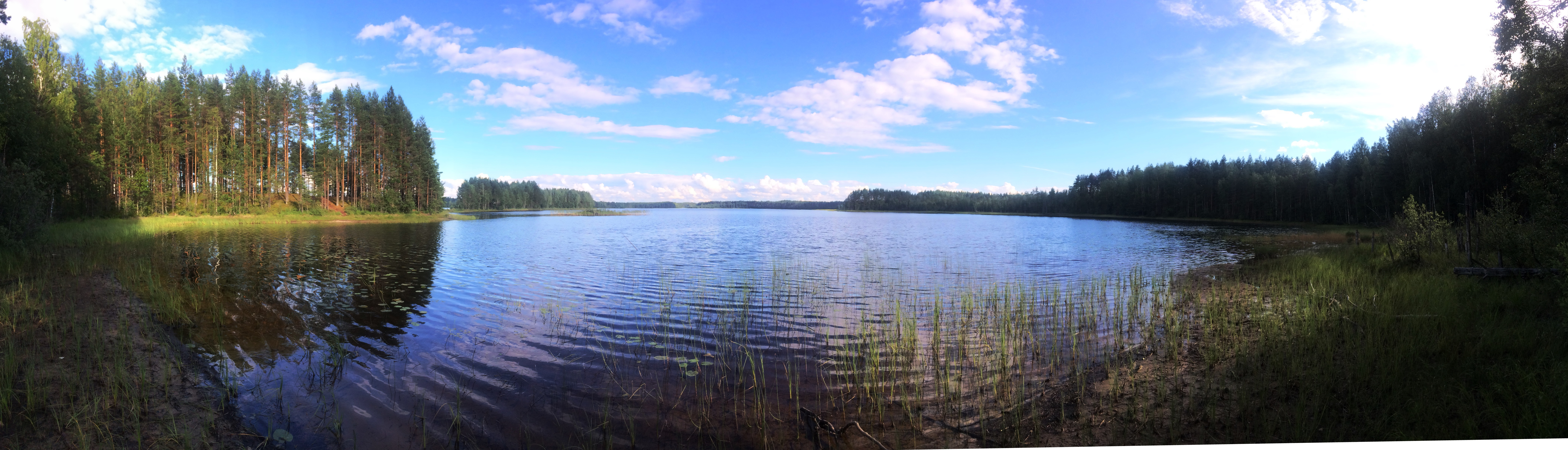 Кудамозеро